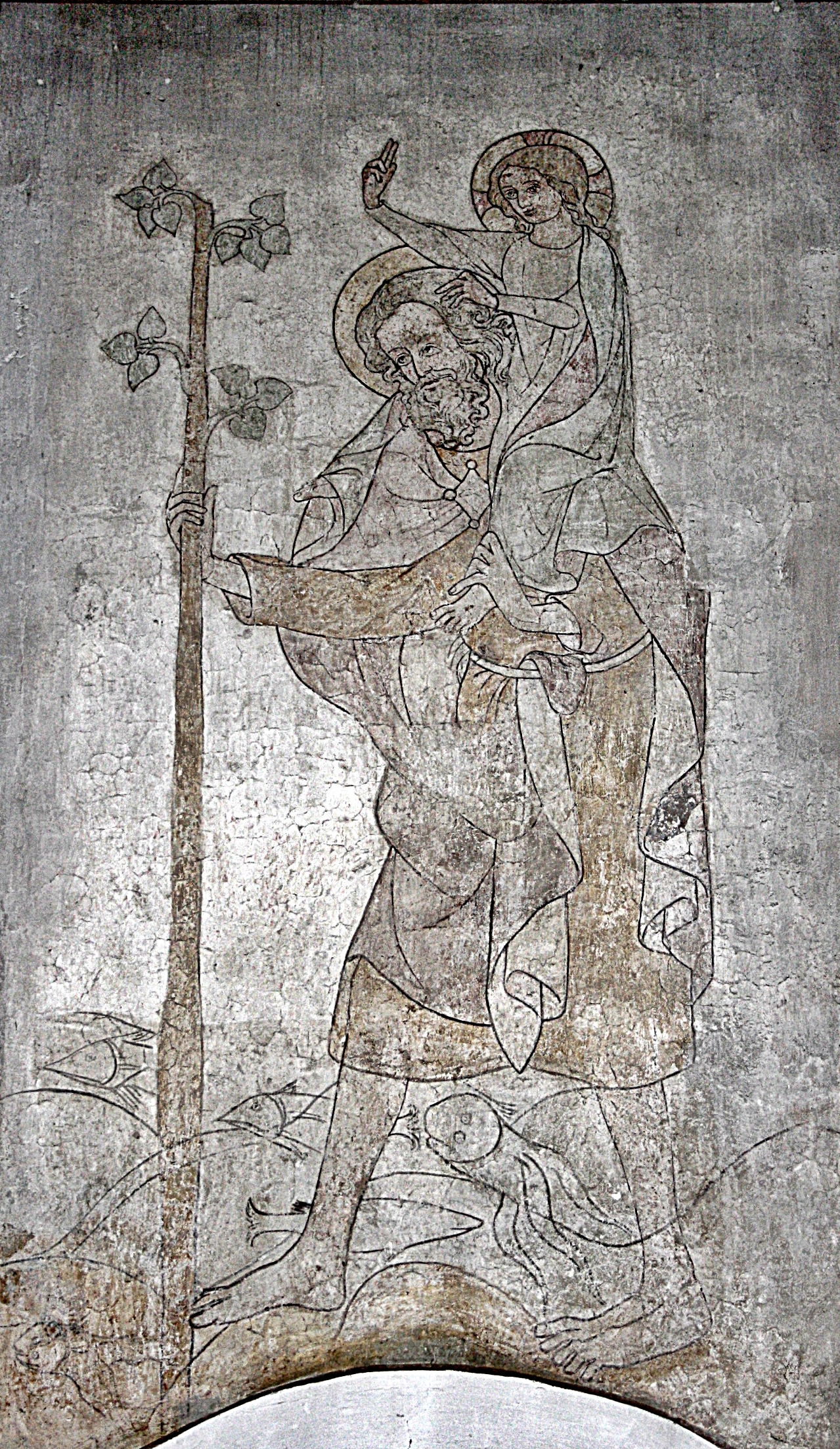 Brilon, Propsteikirche, Christophorus, mittelalterliche Wandmalerei